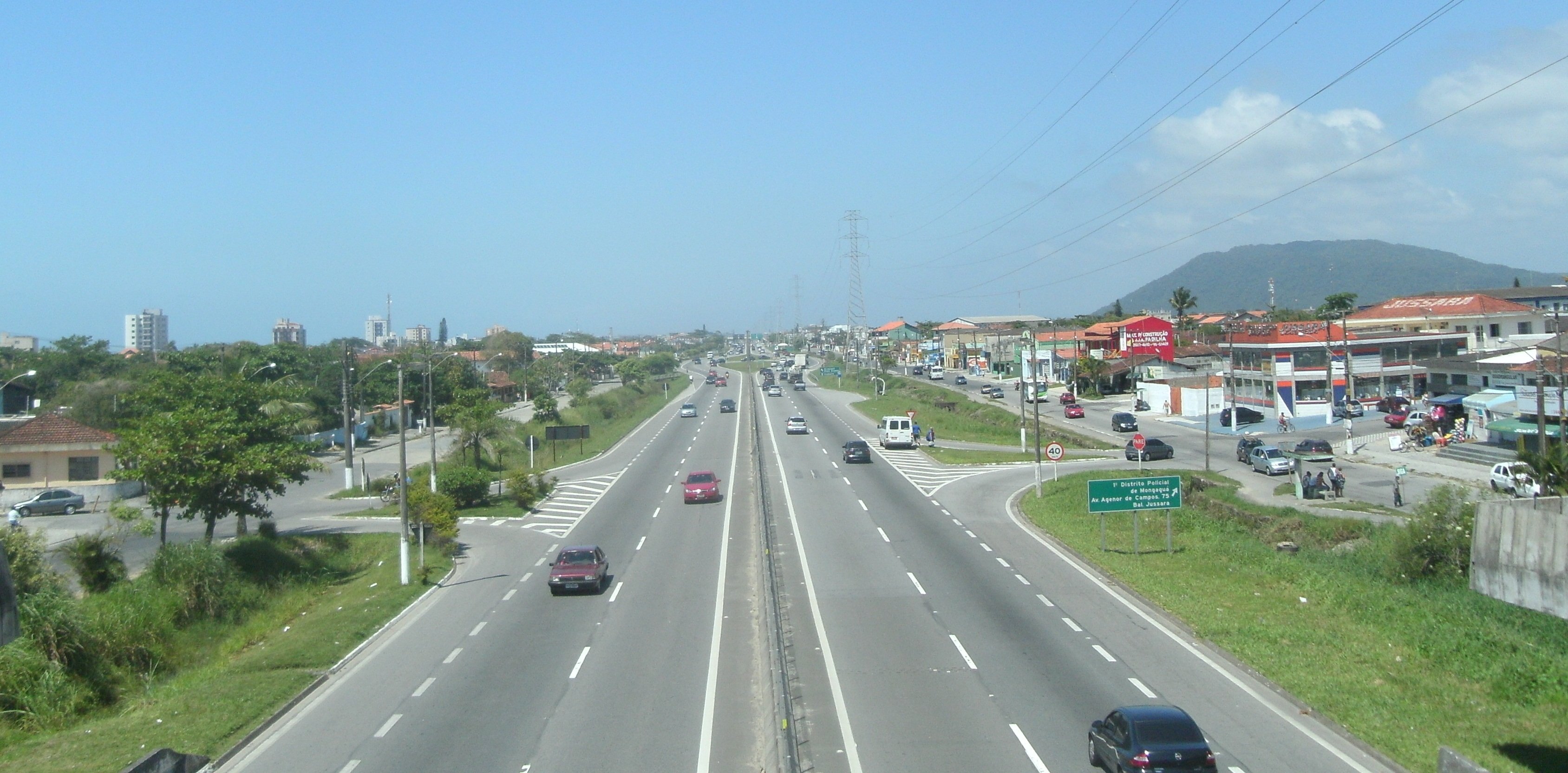 Vista da passarela que cruza Rodovida Padre Manoel da Nóbrega, na altura do km 311, próxima ao trevo do bairro Jussara, em Mongaguá, São Paulo.